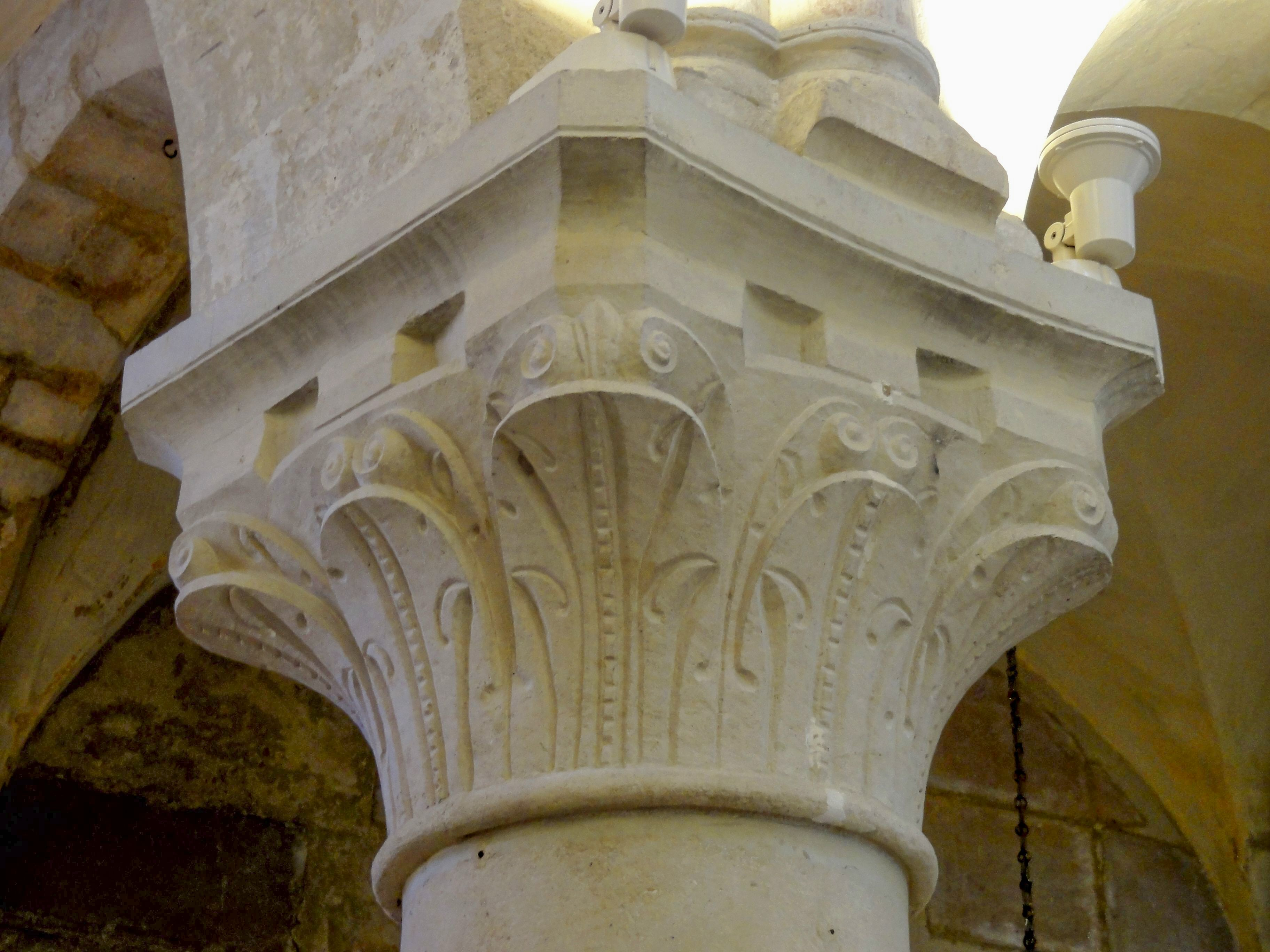 Rond-point de l'abside, cinquième chapiteau (dans le sens de l'horloge), devant la sacristie.